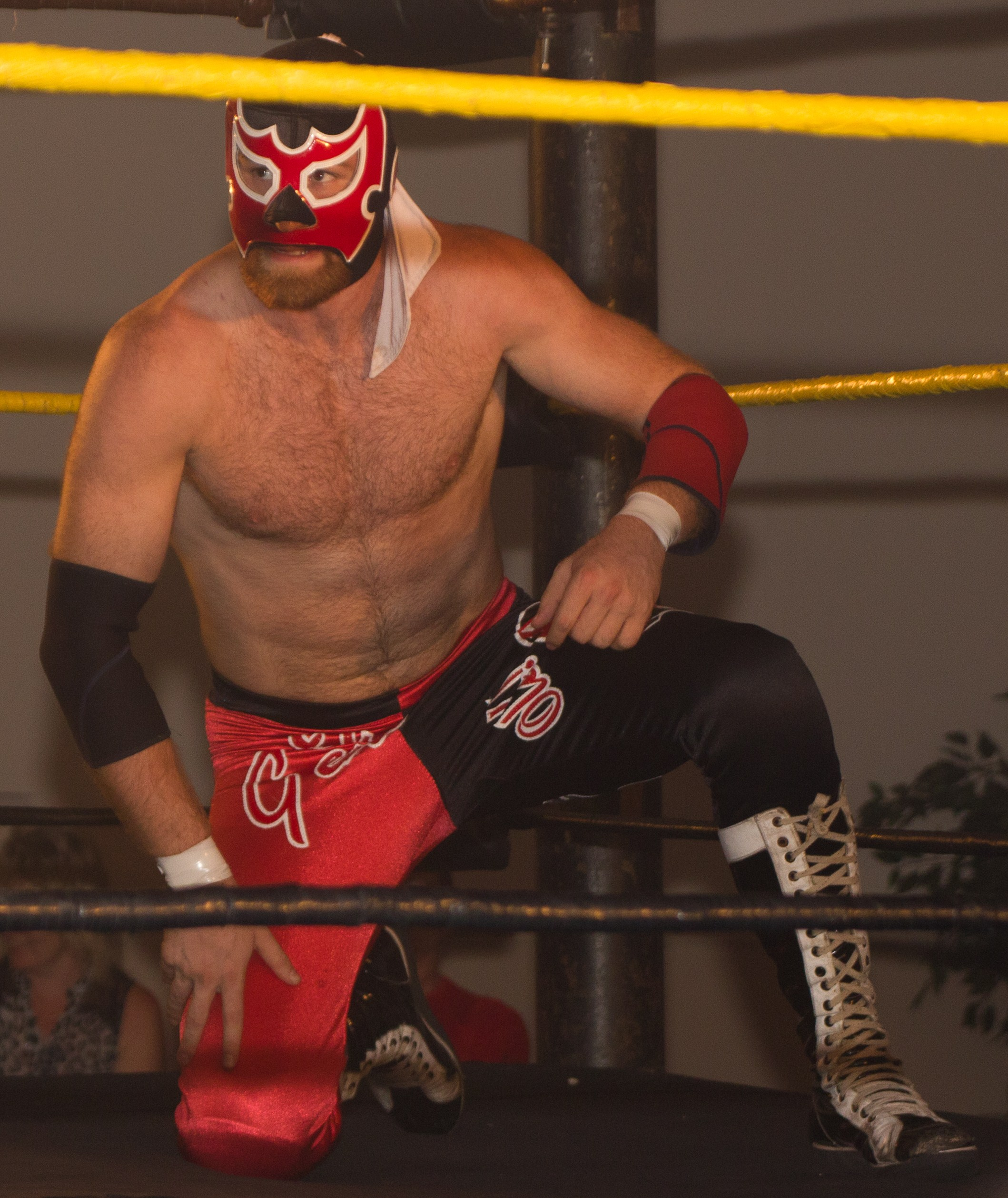 Эль Дженерико на шоу Chikara's The Foggiest Notion